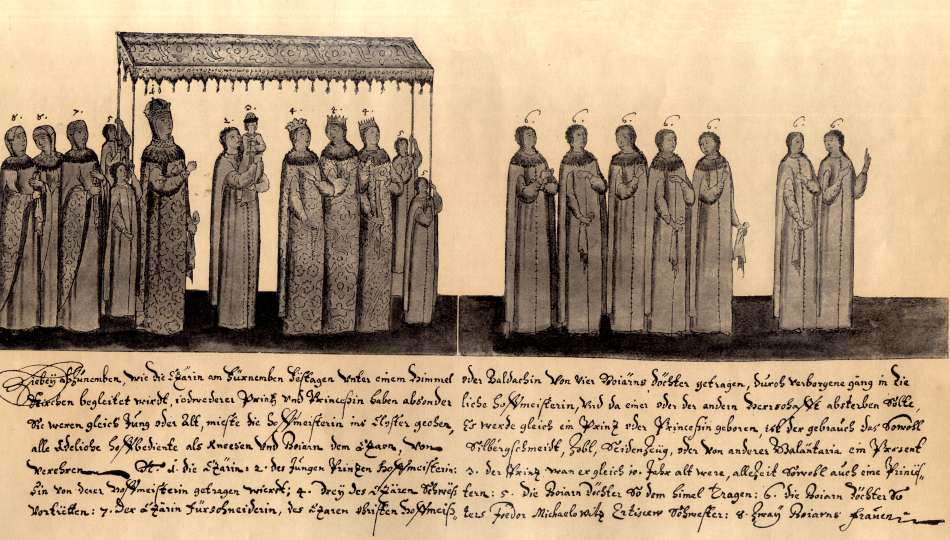 Торжественный выход русской царицы Марии Ильиничны (Милославской) в церковь. Рисунок из Альбома Мейерберга. XVII в. На рисунке из Альбома Мейерберга показан торжественный выход в церковь русской царицы Марии Ильиничны (Милославской), первой супруги царя Алексея Михайловича, с наследником трона, десятилетним царевичем Алексеем Алексеевичем (1654—1670). Царицу сопровождают сестры ее мужа и свита. Мария Ильинична Милославская изображена под балдахином. На ней длинная свободная шубка из узорной ткани с круглым меховым воротником и откидными рукавами. В левой руке она держит ширинку (шелковый платок). Ее сопровождают «стольничья» Анна Михайловна Вельяминова (урожденная Ртищева, сестра царского приближенного Федора Михайловича Ртищева) и две боярские жены. Они одеты в парадные летники (отличительная черта летника — широкие колоколообразные рукава, срезанные углом). Чтобы концы рукавов не волочились по земле, женщины вынуждены держать руки согнутыми в локтях. К летникам боярынь пристегнуты круглые меховые воротники. На головах у них повойники, плотно закрывающие волосы. Под балдахином также идут мамка с царевичем на руках и царевны Татьяна, Марфа и Евдокия Михайловны. Как и Мария Ильинична, царевны в нарядных, вероятно парчовых, шубках. Поверх непокрытых волос надеты короны. Одна из сестер держит в правой руке четки. Впереди шествия художник нарисовал боярских дочерей.